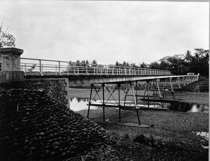 Foto. De brug over de Klawing rivier, ook de spoorbrug van de suikerfabriek Bodjong.